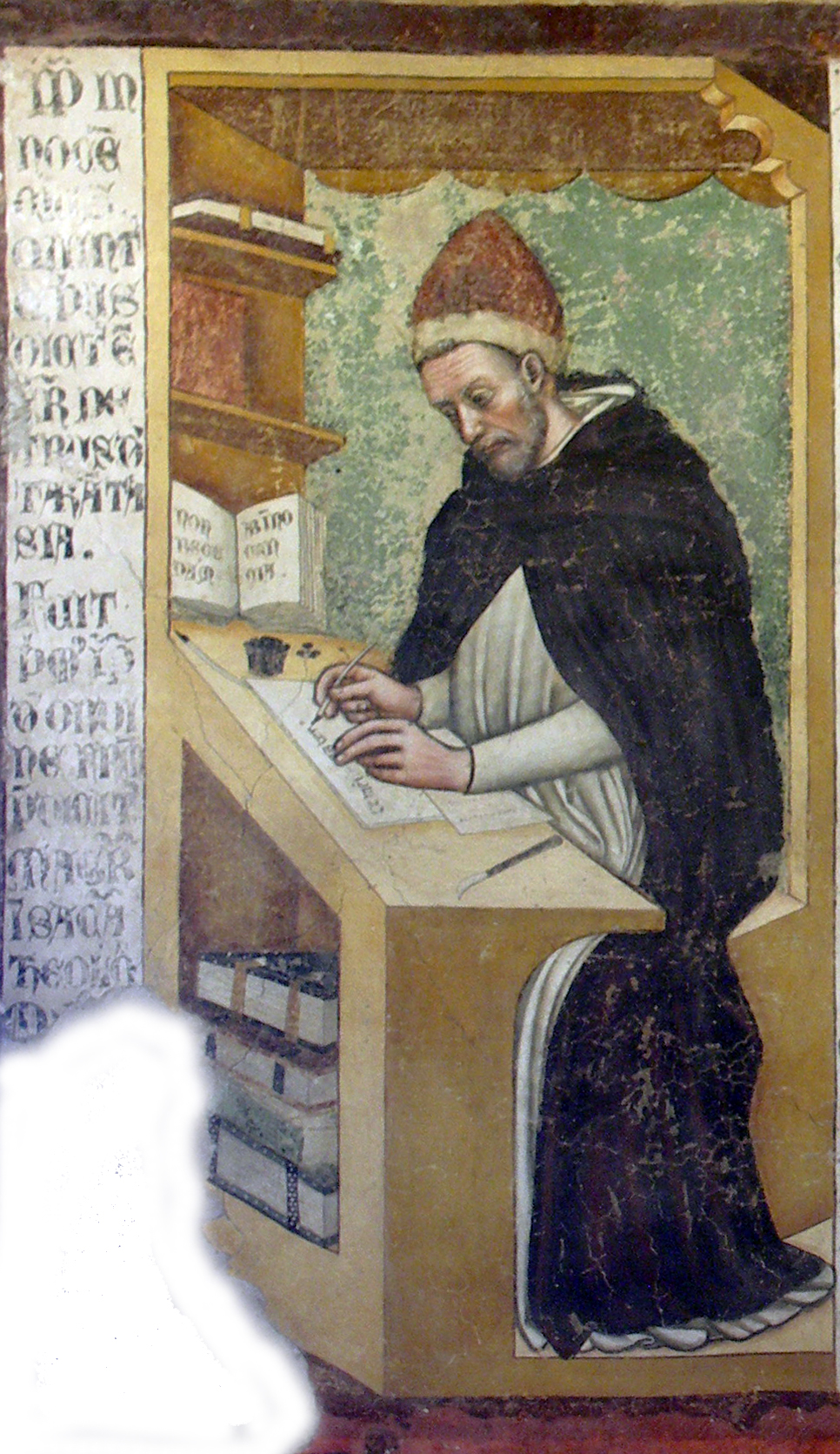 papa Innocenzo V, serie dei Quaranta domenicani illustri, ex convento di San Niccolò, Sala del Capitolo, Treviso, 1352 (altezza di ciascun ritratto 150 cm circa)